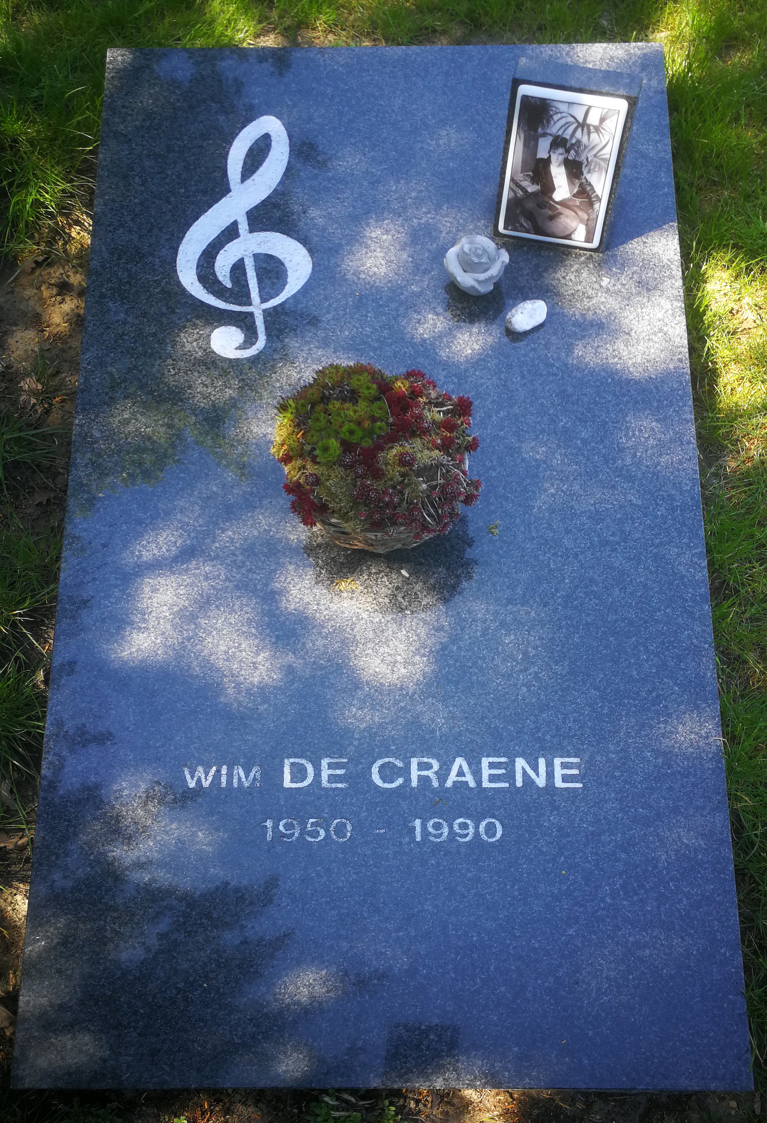 Graf Wim De Craene Melle 14-05-2019